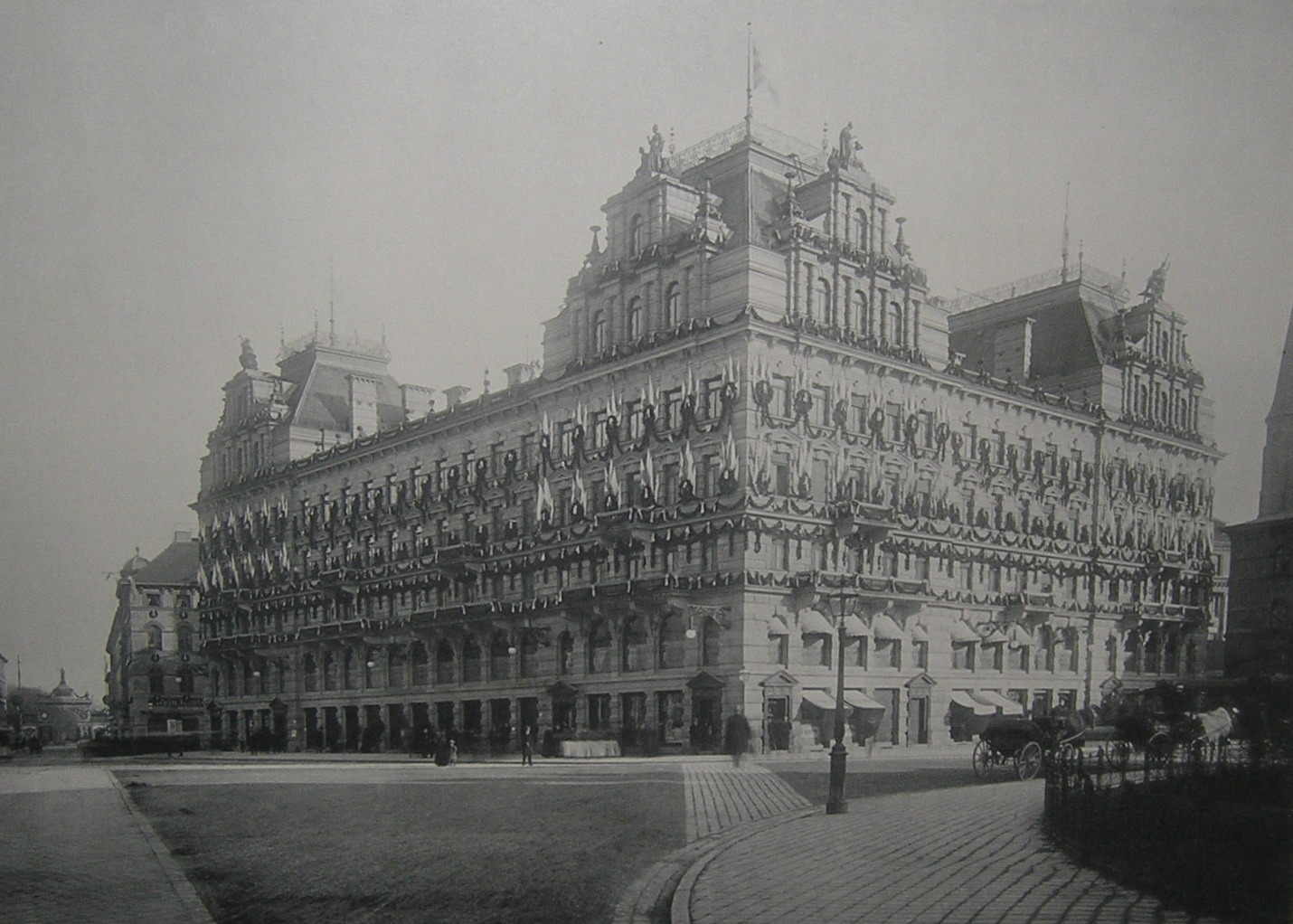 Chromolithographie des Luitpoldblock an der Brienner Straße um 1888